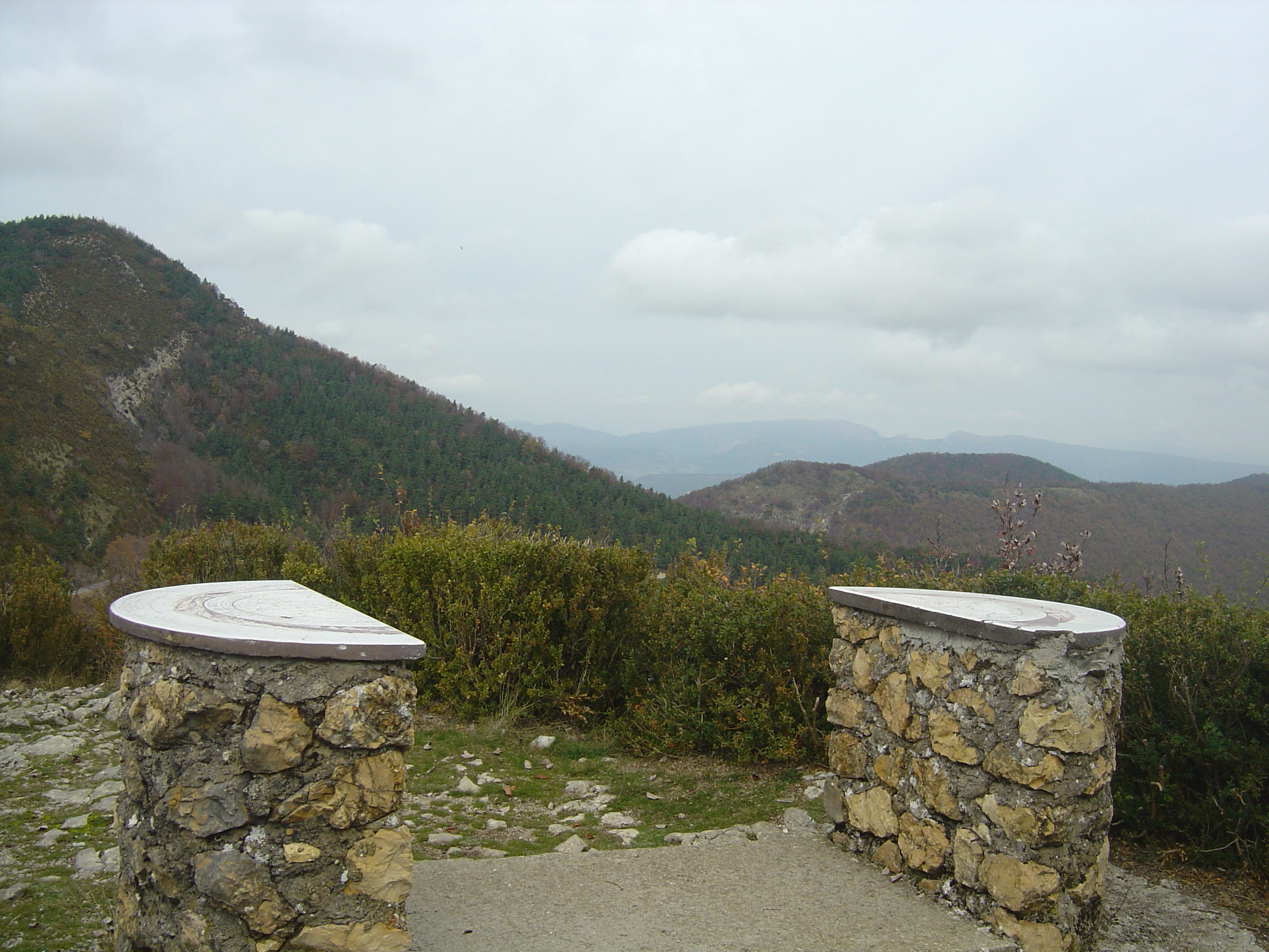 Table d'orientation (1330m) au-dessus du col de Perty (1302m). Vue à gauche sur la montagne de l'Arsuc (1461m) et au centre au fond sur la montagne de l'Aup le Duffre (1757m).